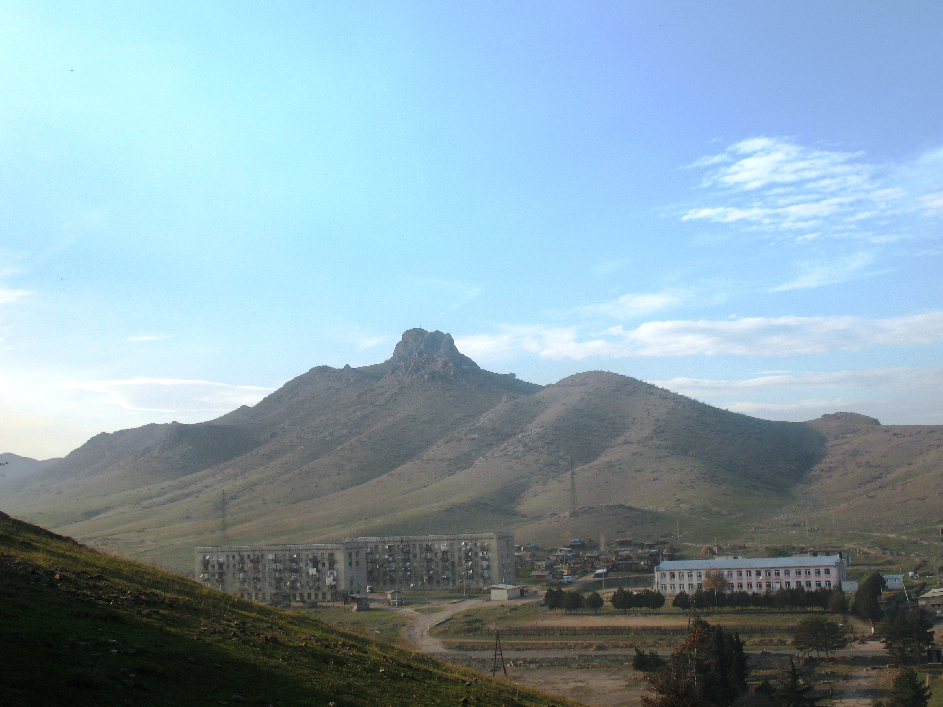 შულავერი